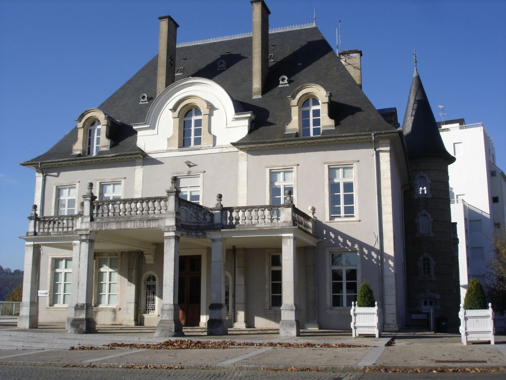 Casteth d'Este